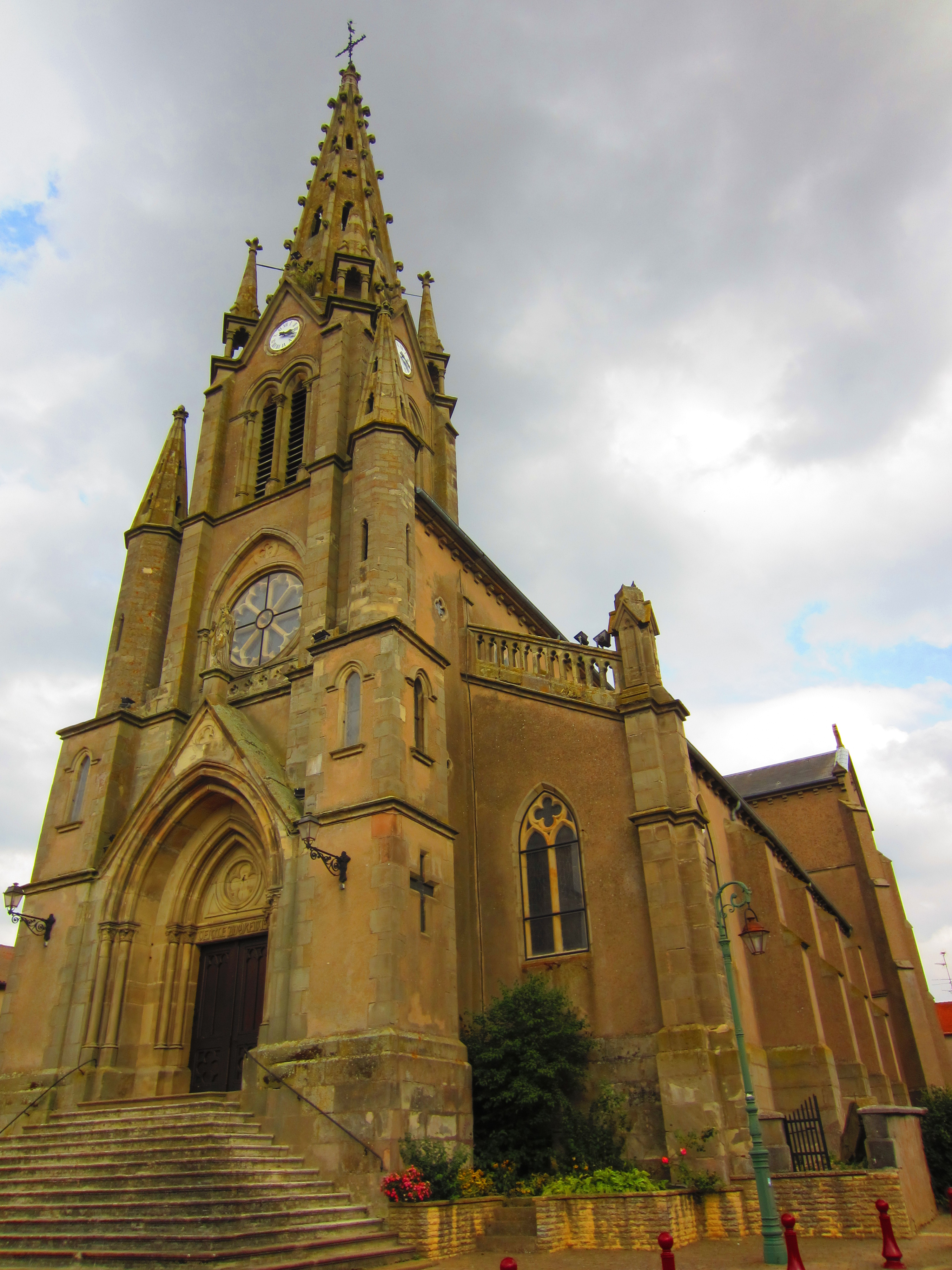 Eglise Coume